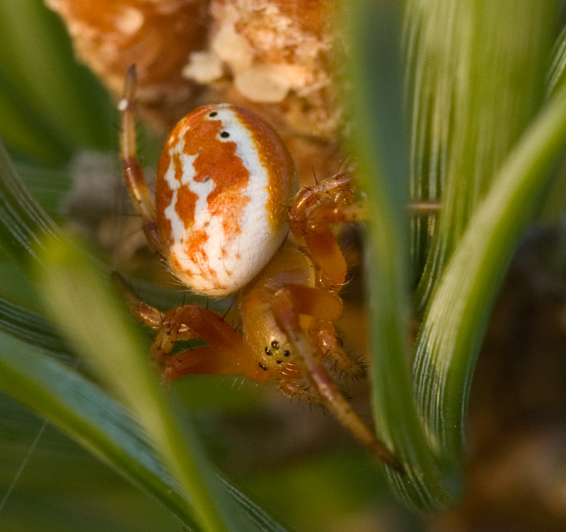 Araniella displicata, adult female, on pine.